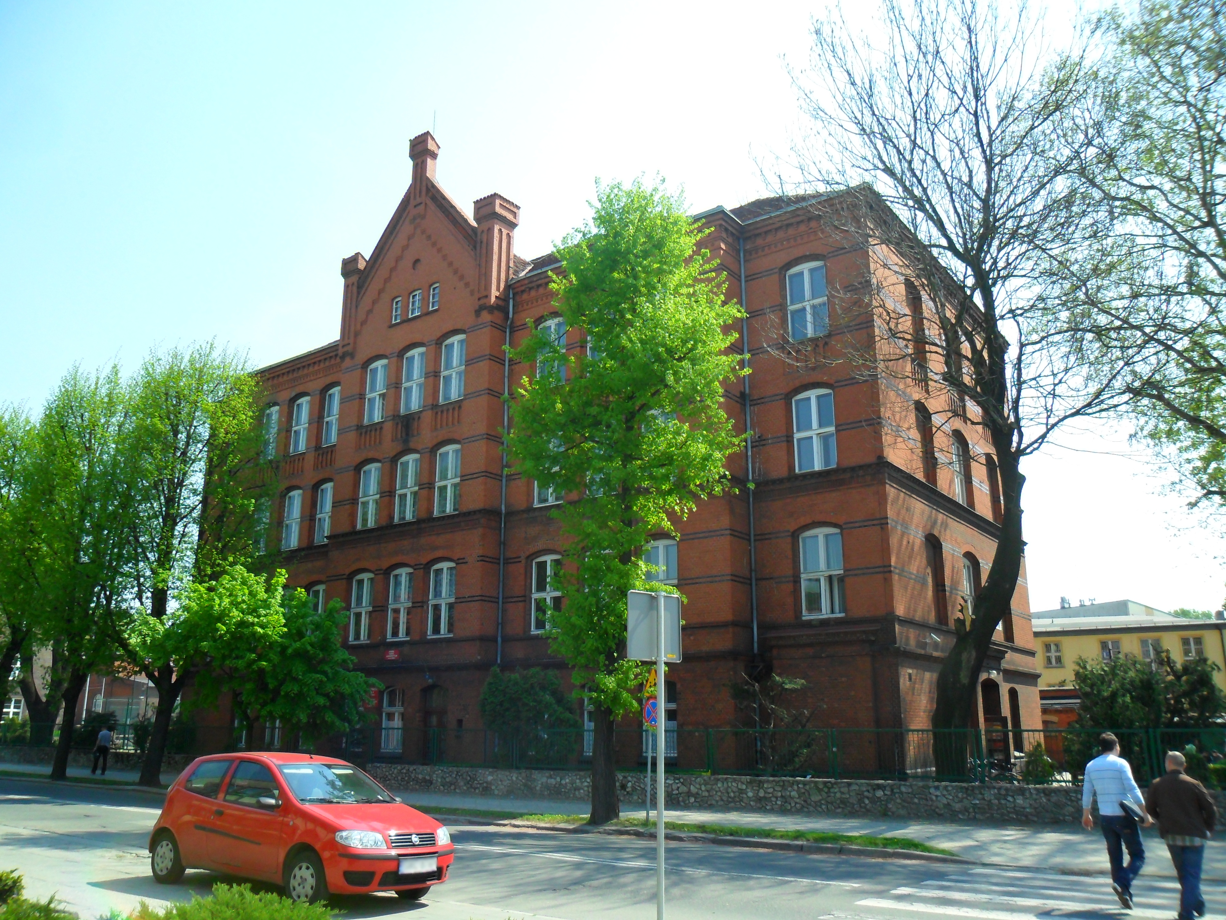 Racibórz, ul. Wileńska 8 - dawna szkoła powszechna z 1908, obecnie Zespół Szkół Zawodowych